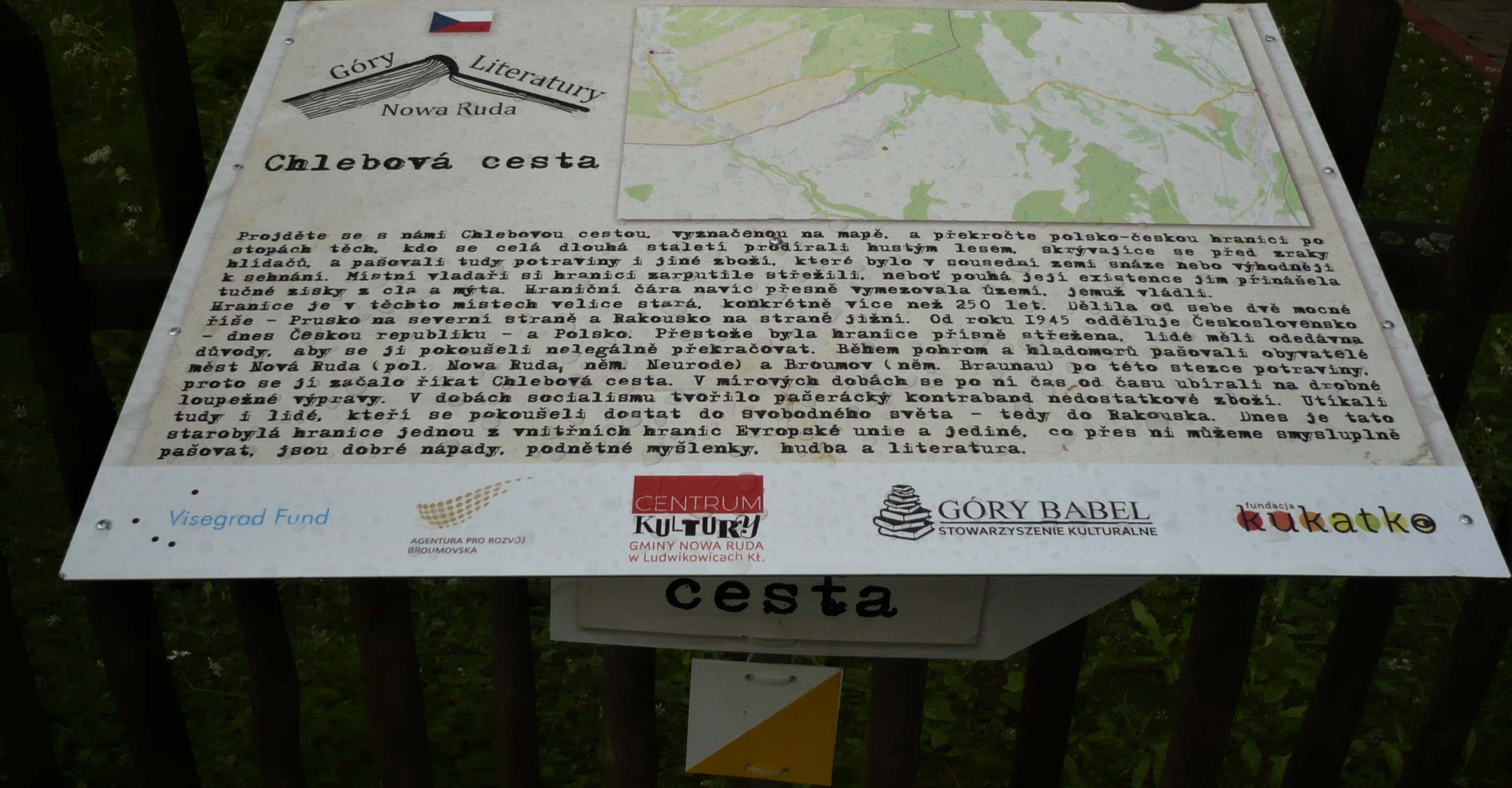 Początek Drogi Chlebowej w Sonovie